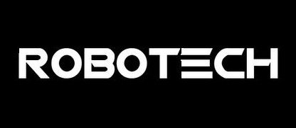 Cita al logo utilizado en la serie Robotech